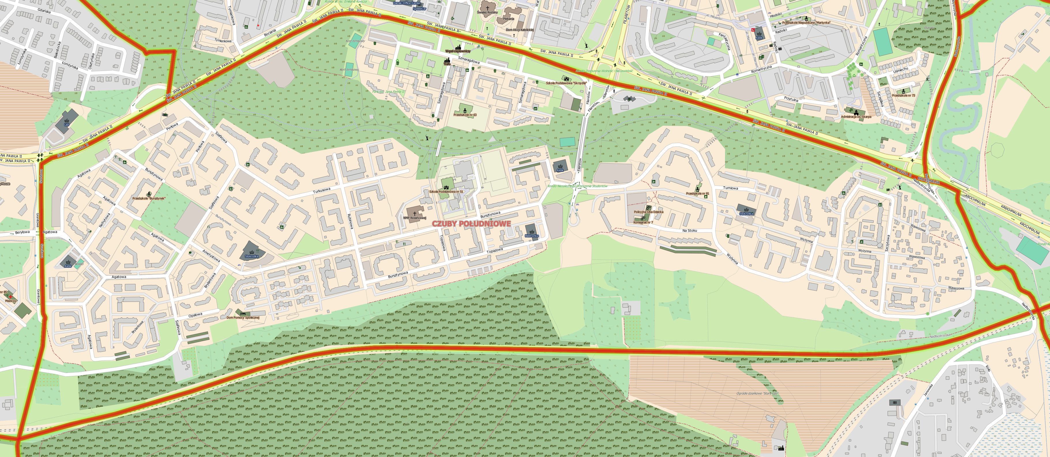 Plan dzielnicy Czuby Południowe w Lublinie.